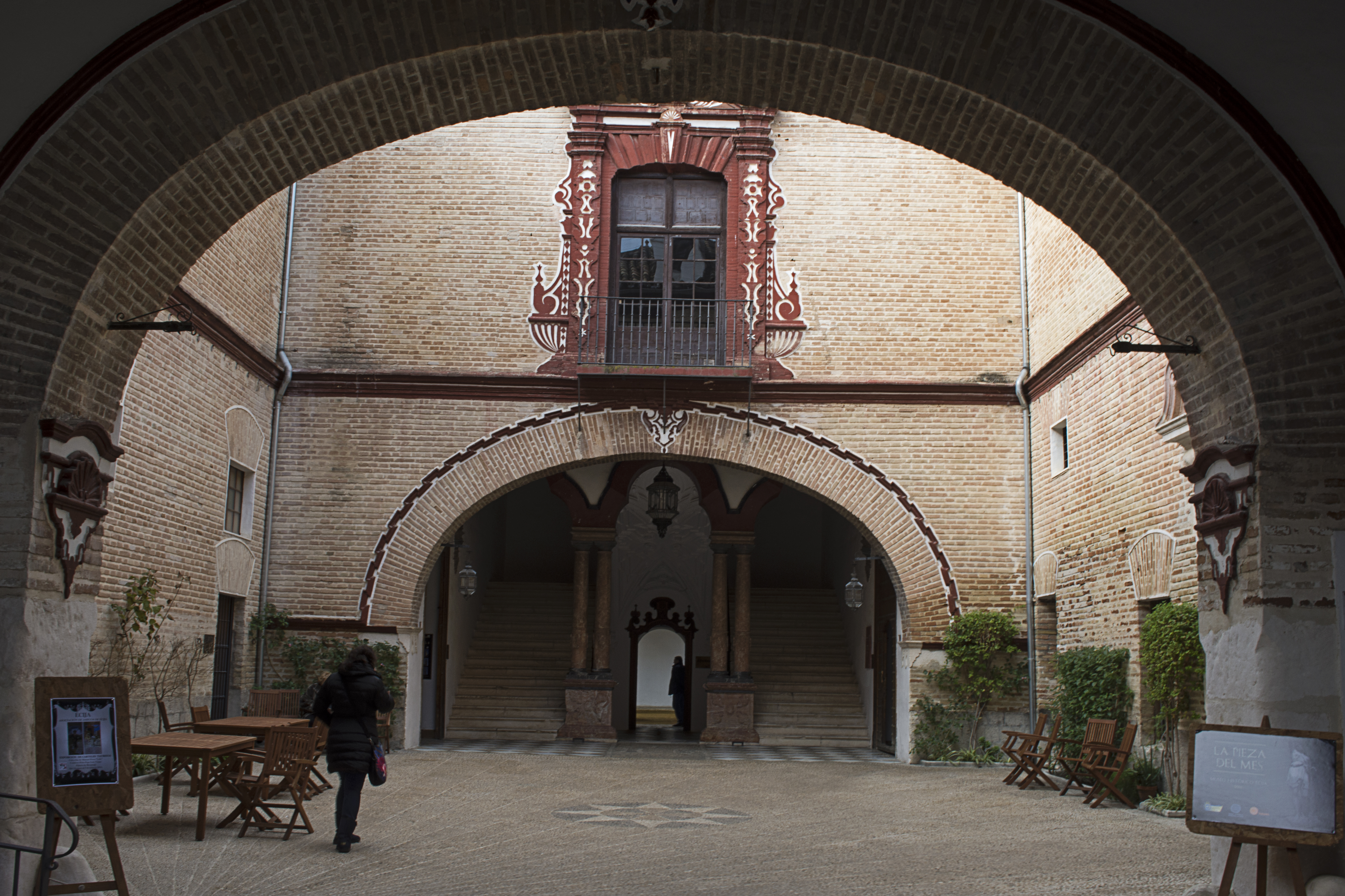 Palacio de Benamejí. Museo Histórico Municipal. Écija. (España)